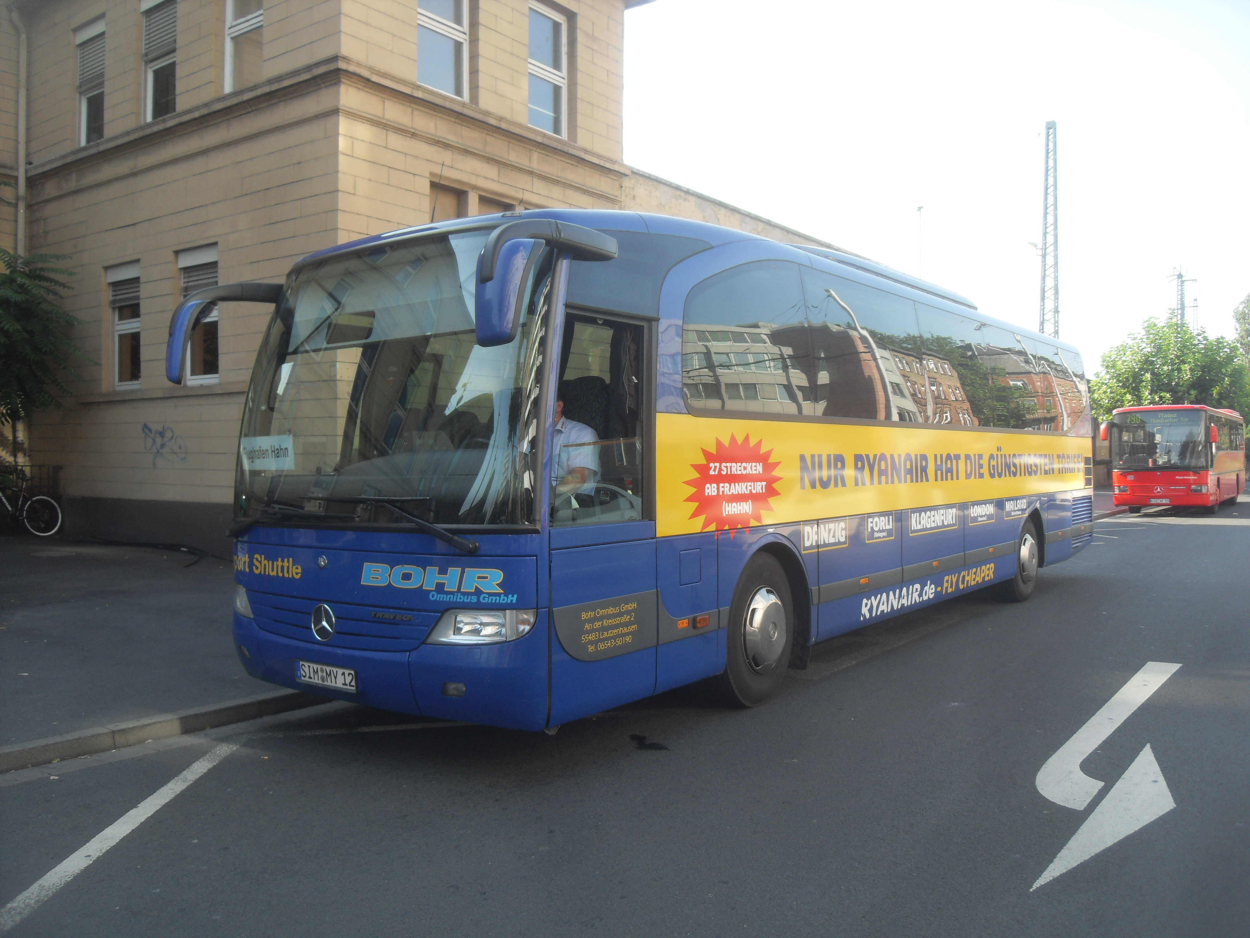 Mercedes-Benz-Bus Travego am Mainzer Hauptbahnhof als Airport Shuttle zum Flughafen Frankfurt-Hahn